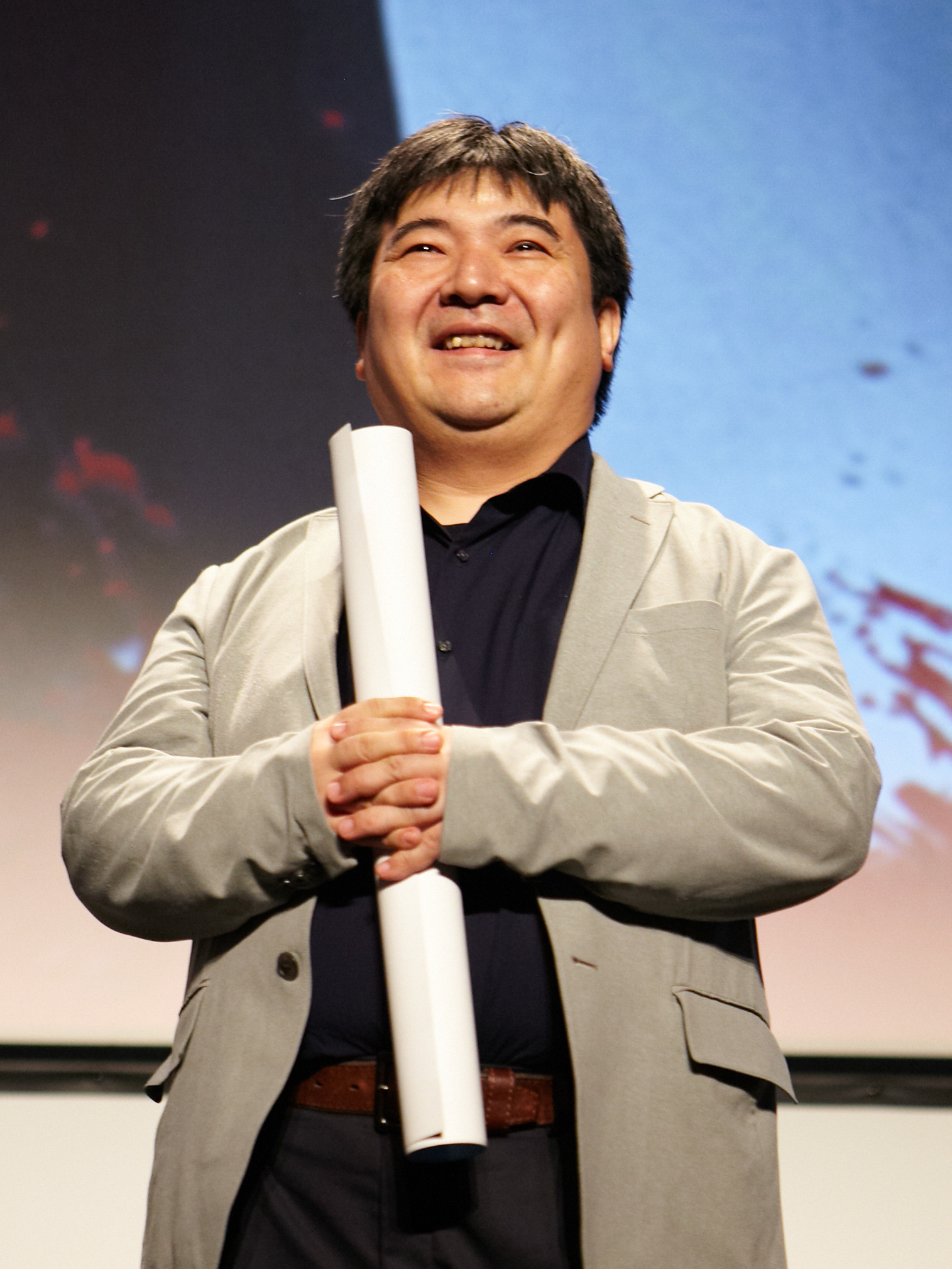 Argazkia / Fotografía: Floro Azqueta